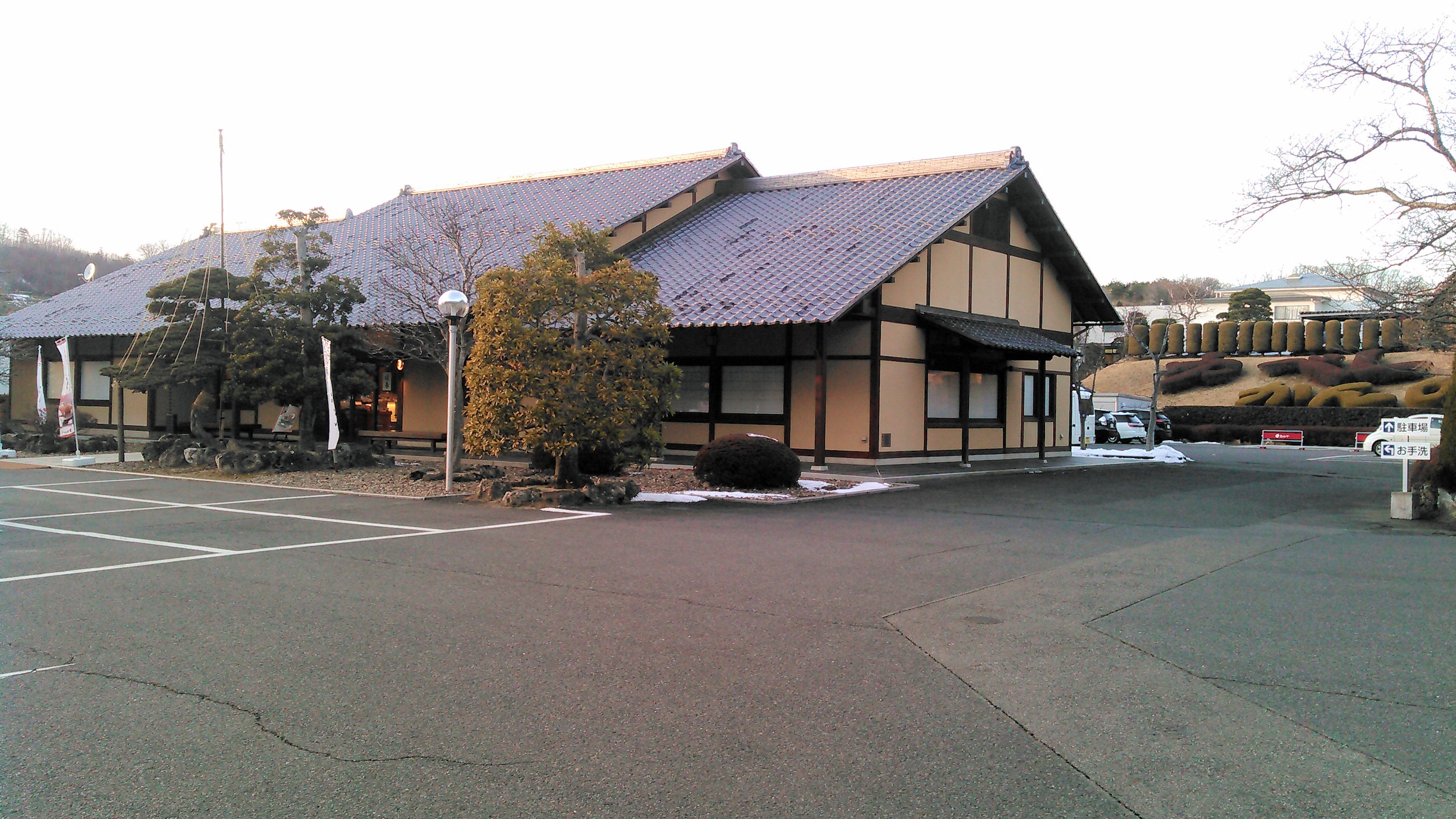 郡山市 かんのや 本店文助